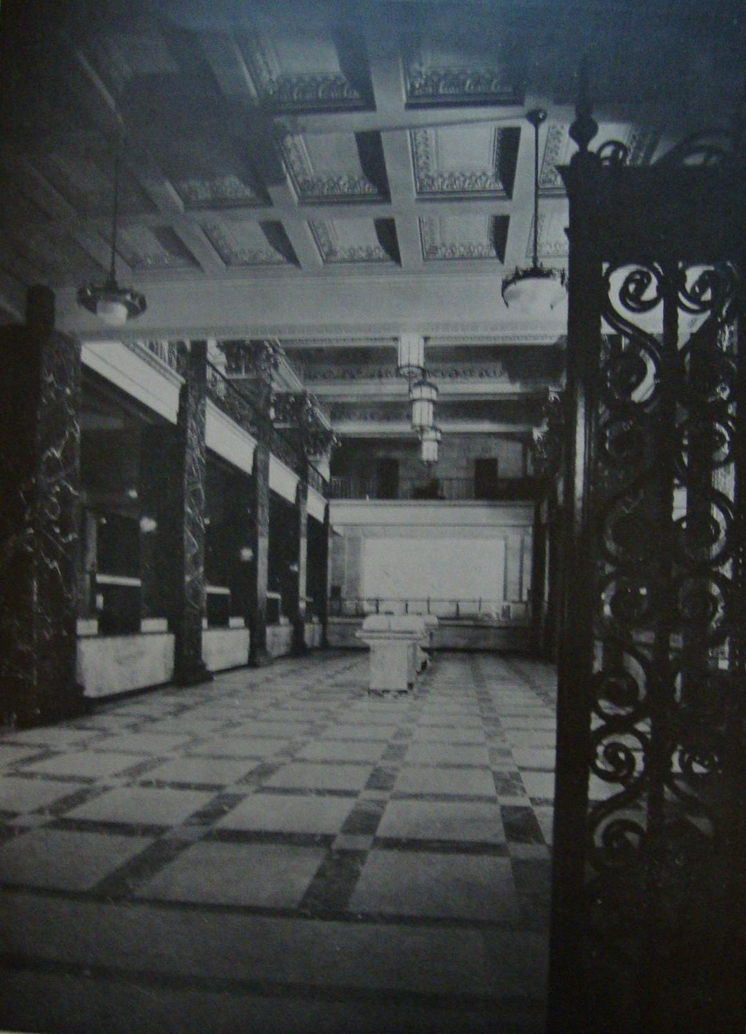 Parte del hall principal del edificio del Banco Popular Argentino. Esquina de las calles Tte. Gral. Juan D. Perón y Florida.